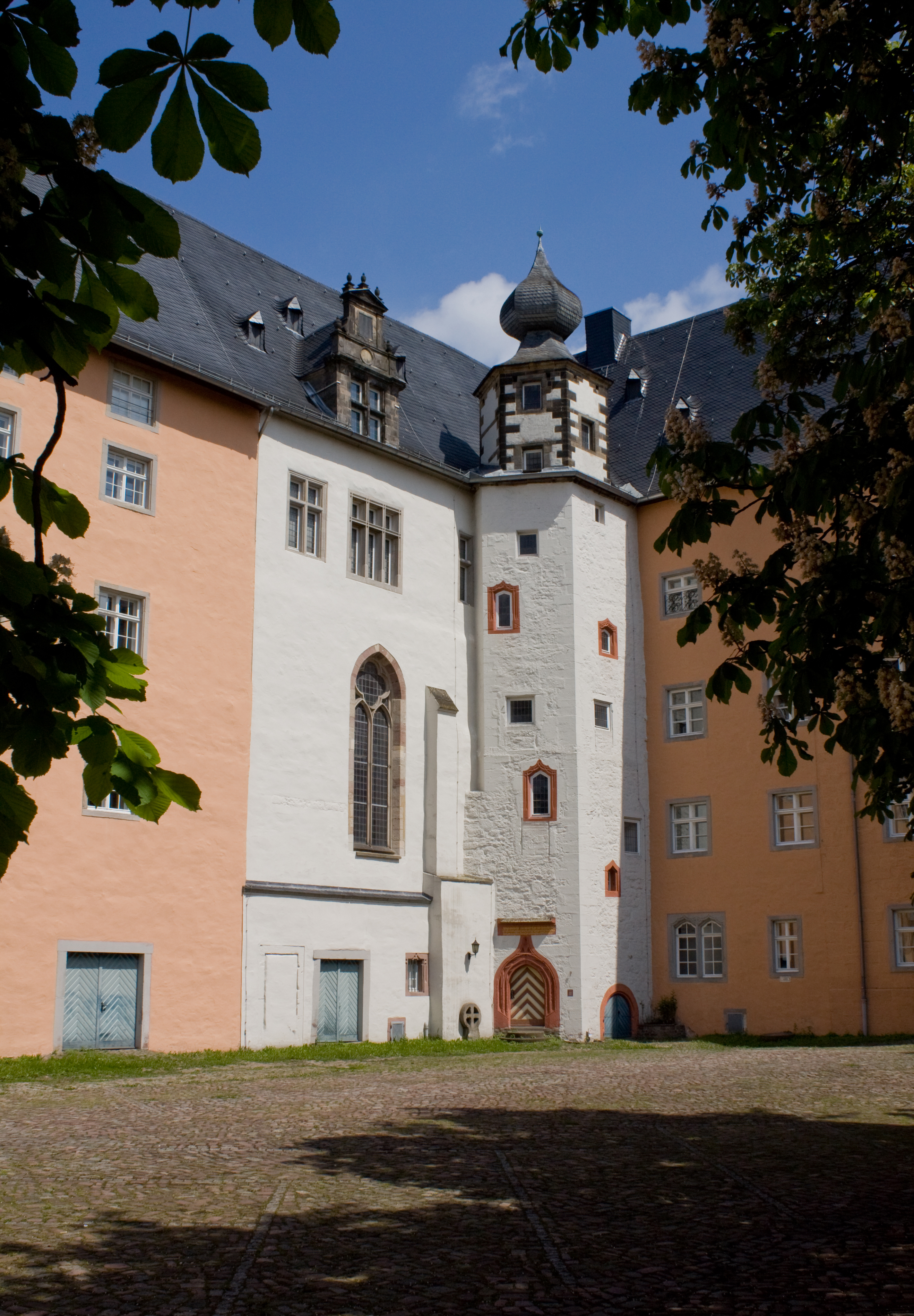 Hann. Münden, Welfenschloss